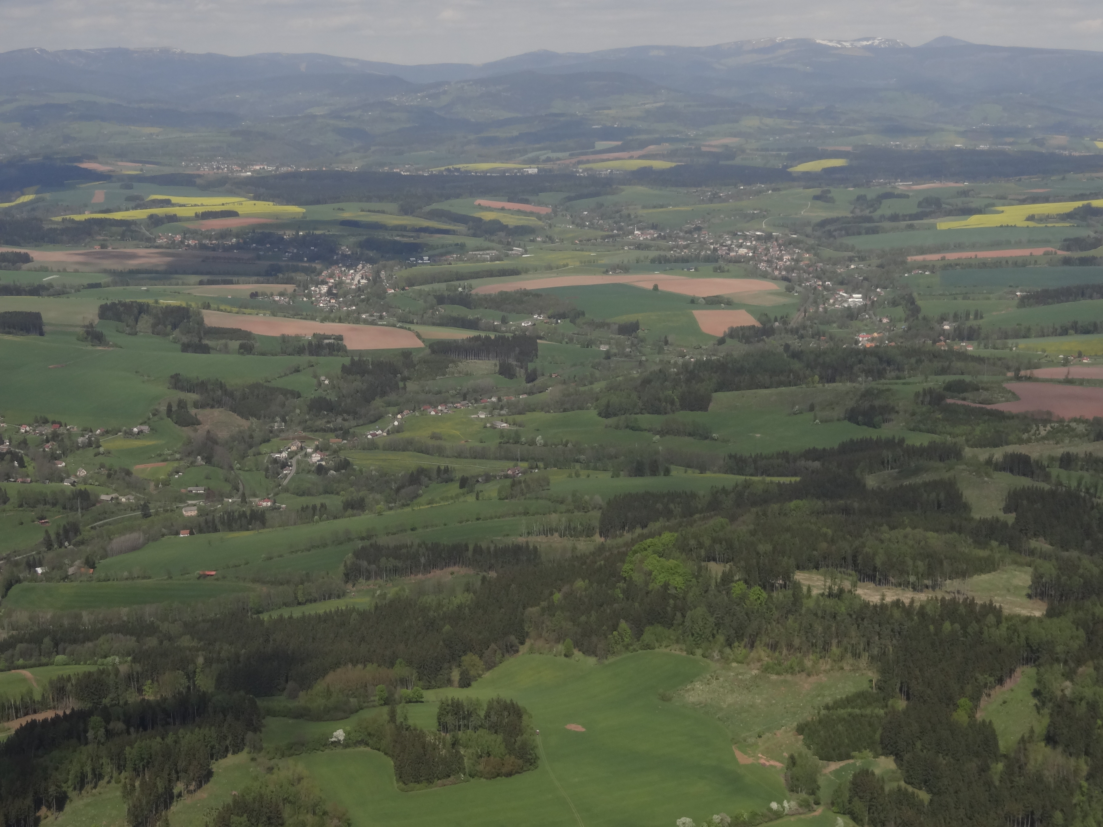 Tample, Kruh, Roztoky u Jilemnice a Krkonoše